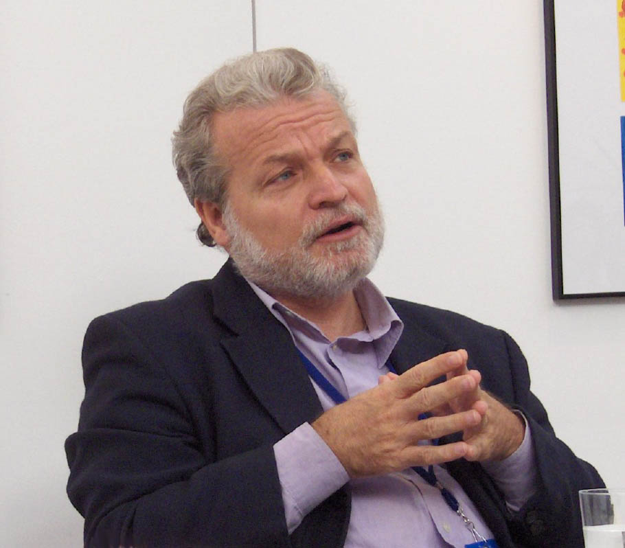 L'écrivain turc Nedim Gürsel lors d'un petit-déjeuner littéraire au cours du 18ème Festival international de géographie de Saint-Dié des Vosges